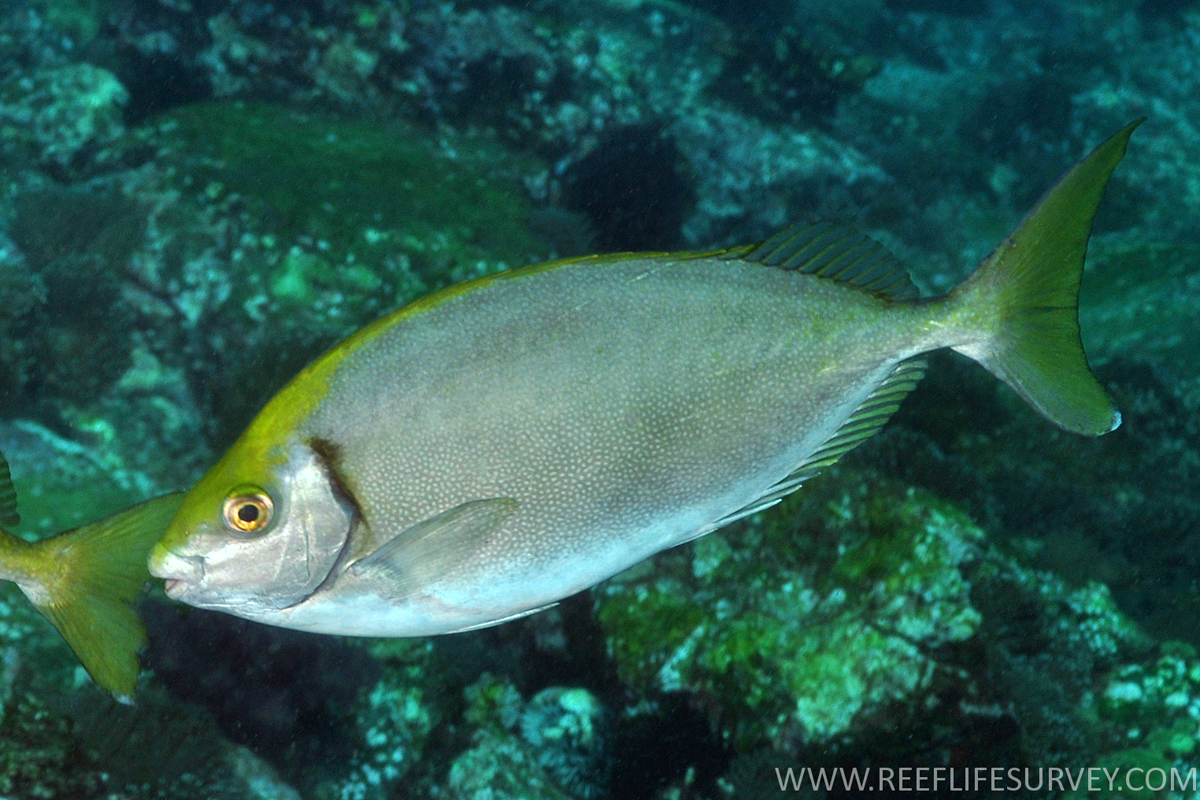 Siganus fuscescens, en Islas Solitarias, Nueva Gales del Sur, Australia